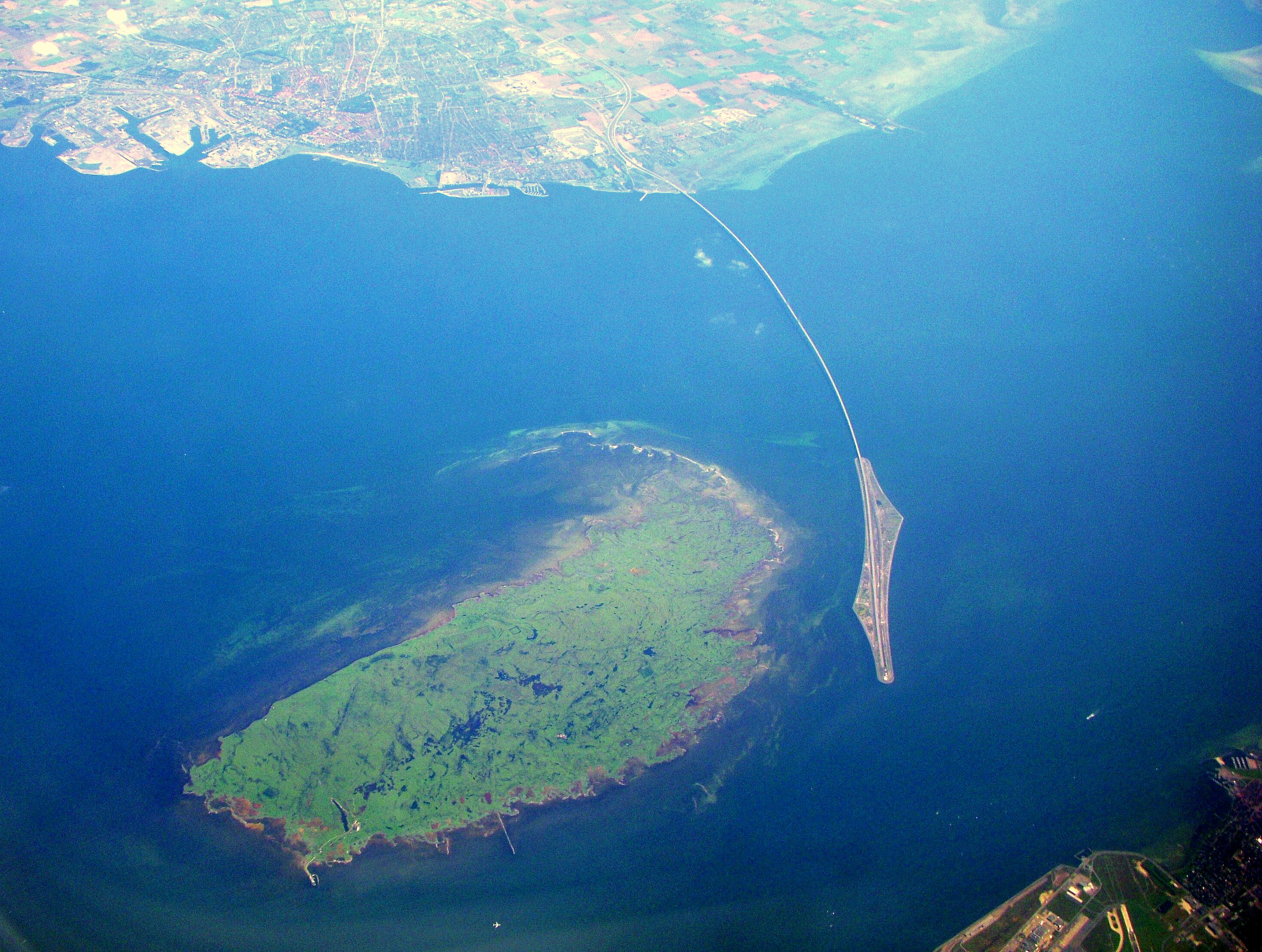 Öresundsbron med Saltholm (i bildmitt) och Pepparholm (t.h.)